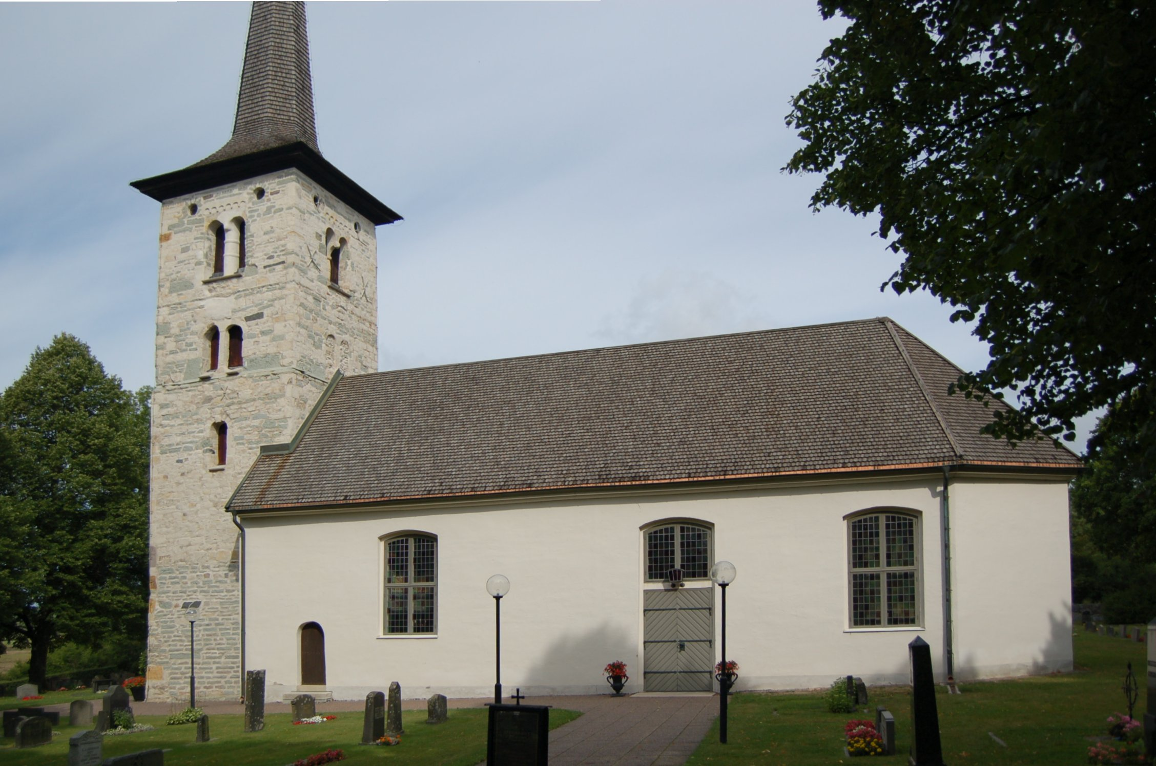 Hovsta kyrka från sydsida. Axbergs församling, Örebro.